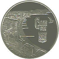 1800 років м. Судаку реверс